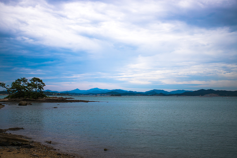 임하도해역입니다.